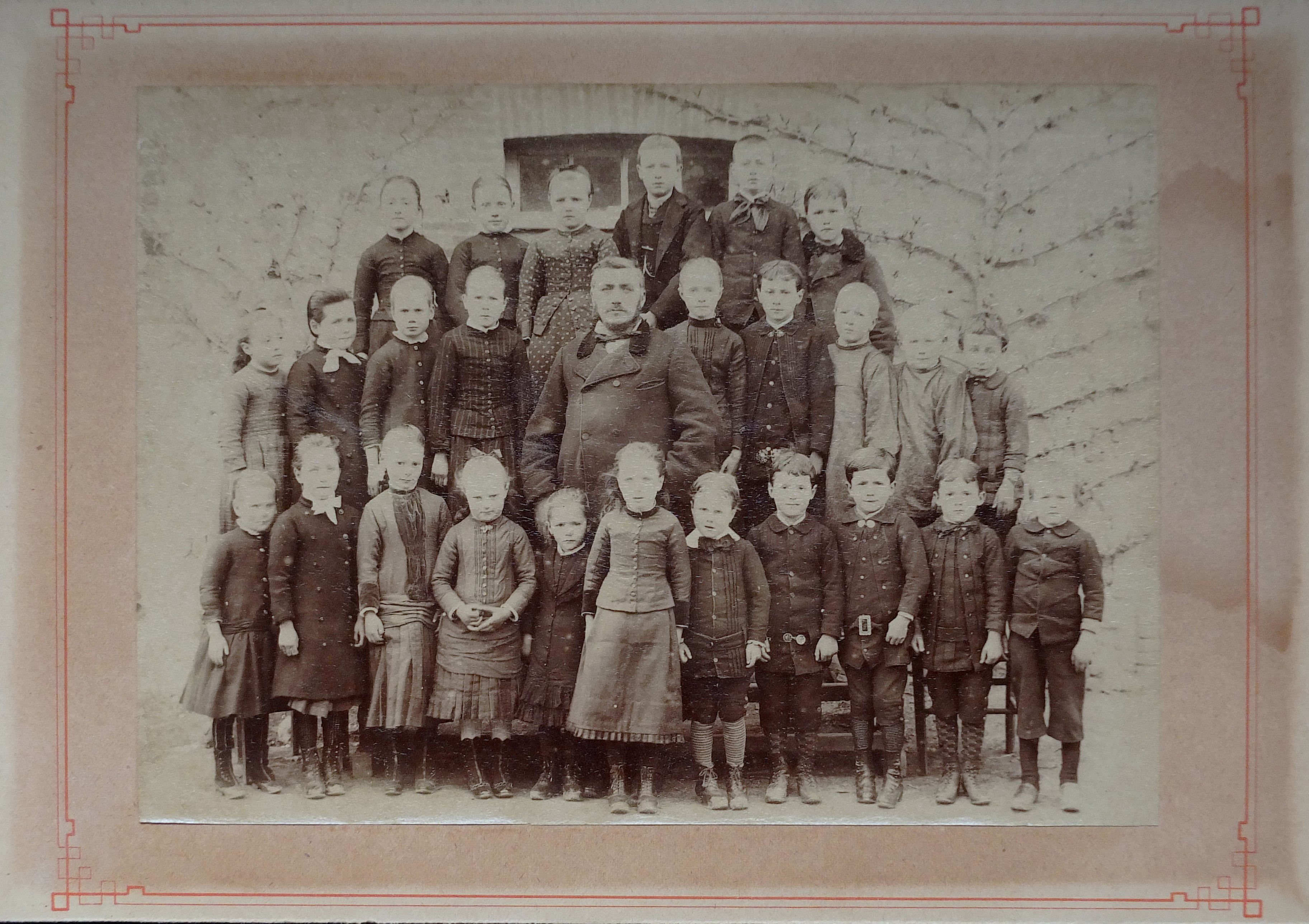 Photo d'une classe non déterminée, vers 1860. Papier albuminé, photographe anonyme. Collection particulière du déposant, cliché 11,5 cm x 16 cm.